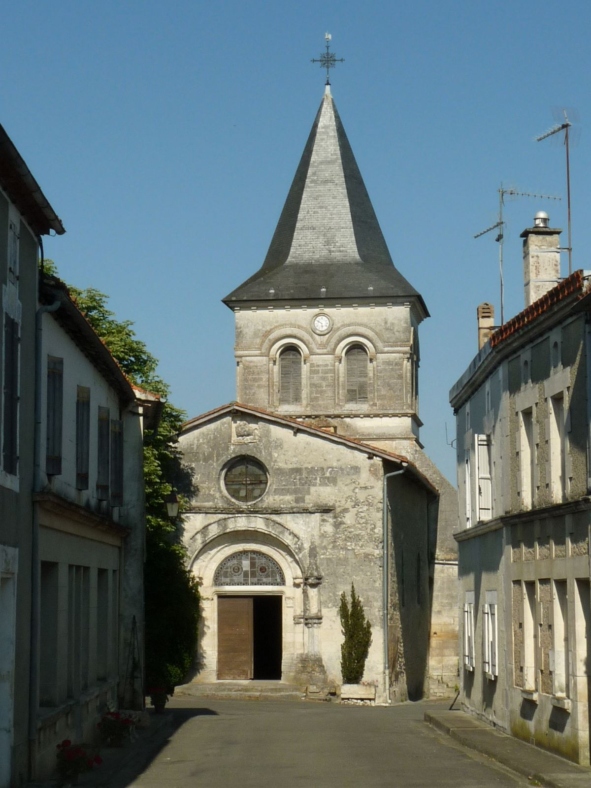 église de Salles-Lavalette, Charente, France